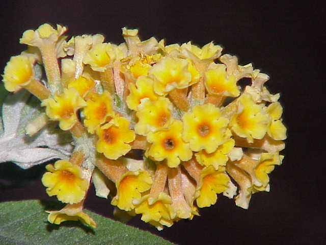 Species: Buddleja globosa Family: Buddlejaceae Image No. 1